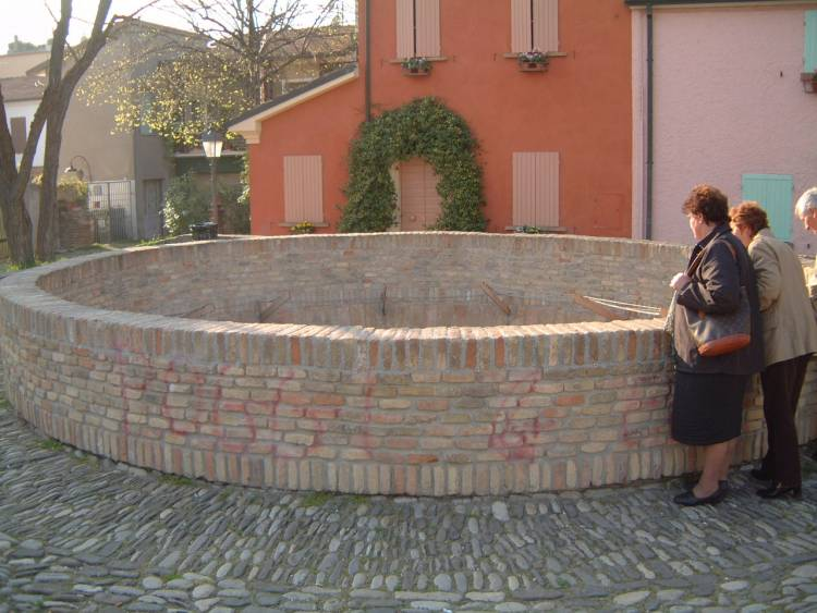 Je suis l'auteur de cette photo réalisée à Cesenatico en avril 2007